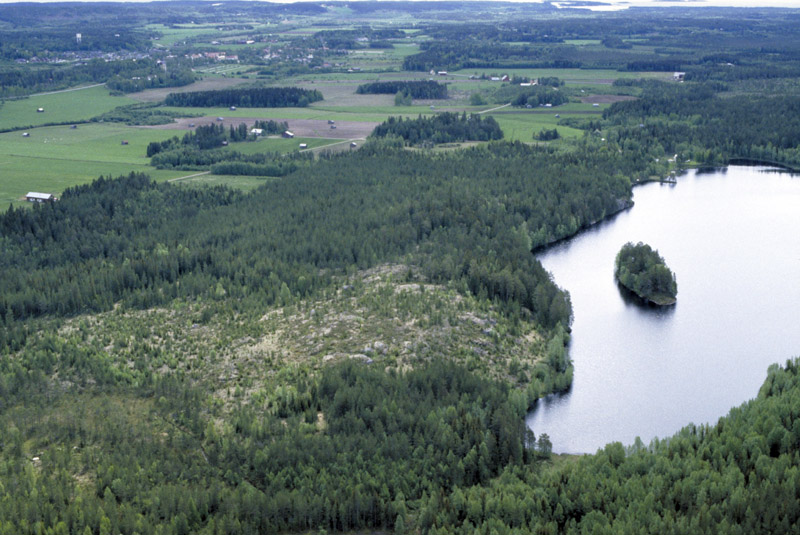 Område med rösen och stensättningar från brons- och järnålder. Bilden är tagen mot (väderstreck): SO Motiv: Holmsjöberget Nyckelord: Flygbilder, Riksintressen Kategori: Insjömiljöer Område med rösen och stensättningar från brons- och järnålder. Bilden är tagen mot (väderstreck): SO.